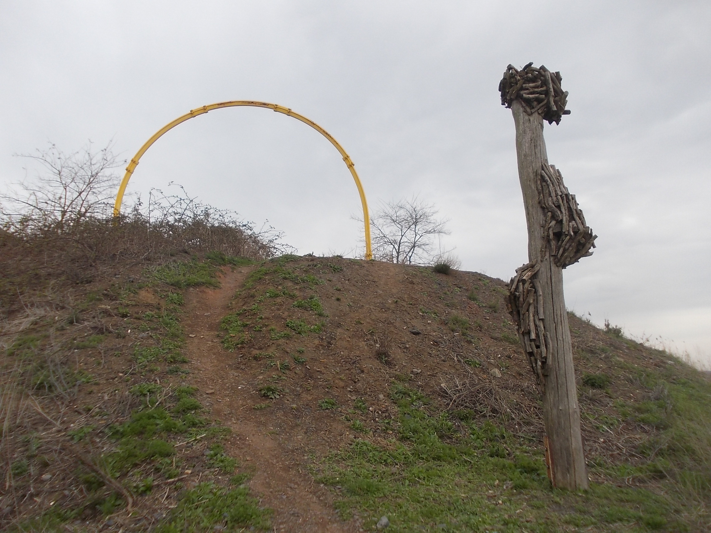 "Sonnenbogen" mit einer Skulptur auf der Bergehalde Ensdorf